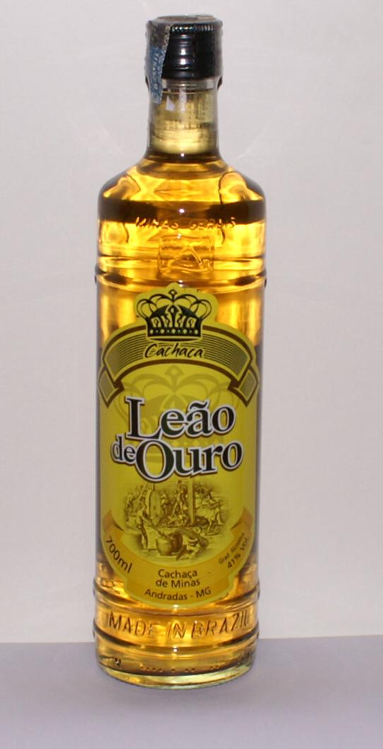 Leão de Norte, Cachaça